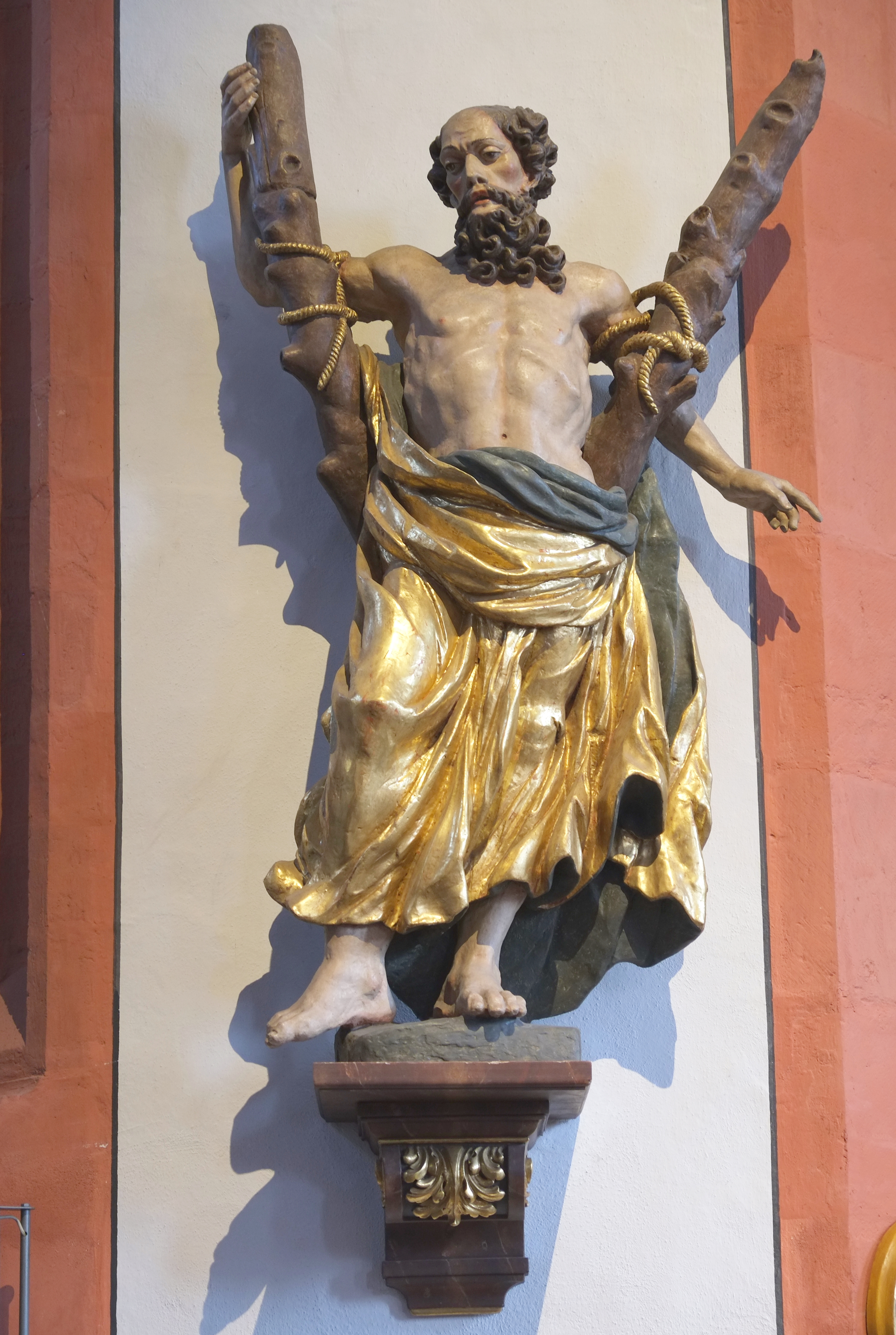 Katholische Pfarrkirche St. Andreas in Karlstadt im Main-Spessart-Kreis (Bayern, Deutschland), Statue des Apostels Andreas